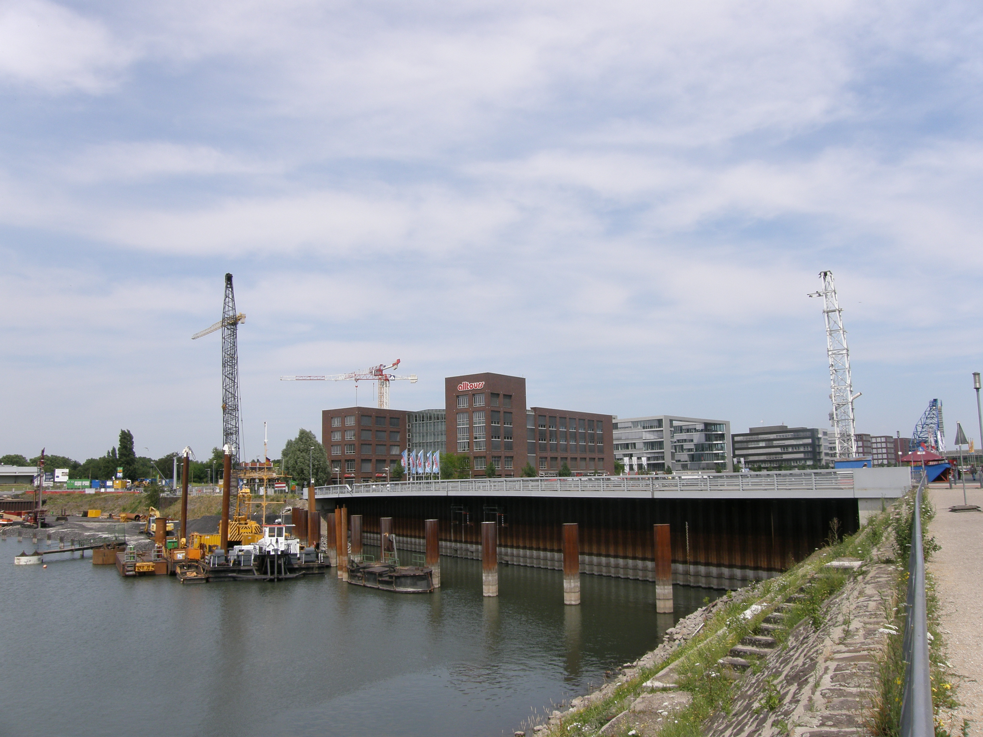 Portmouth Damm als Abtrennung des östlichen "Binnensees" vom restlichen Innenhafen Duisburgs, unten die Dalbenreihe als Schutz vor Schiffsanprall.